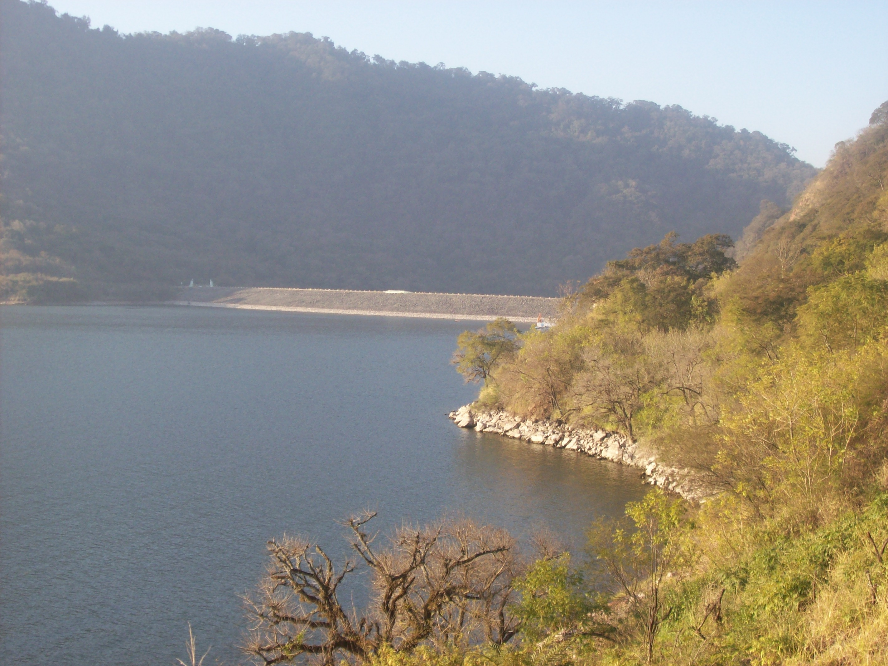 Dique Celestino Gelsi en El Cadillal, provincia de Tucumán, Argentina.